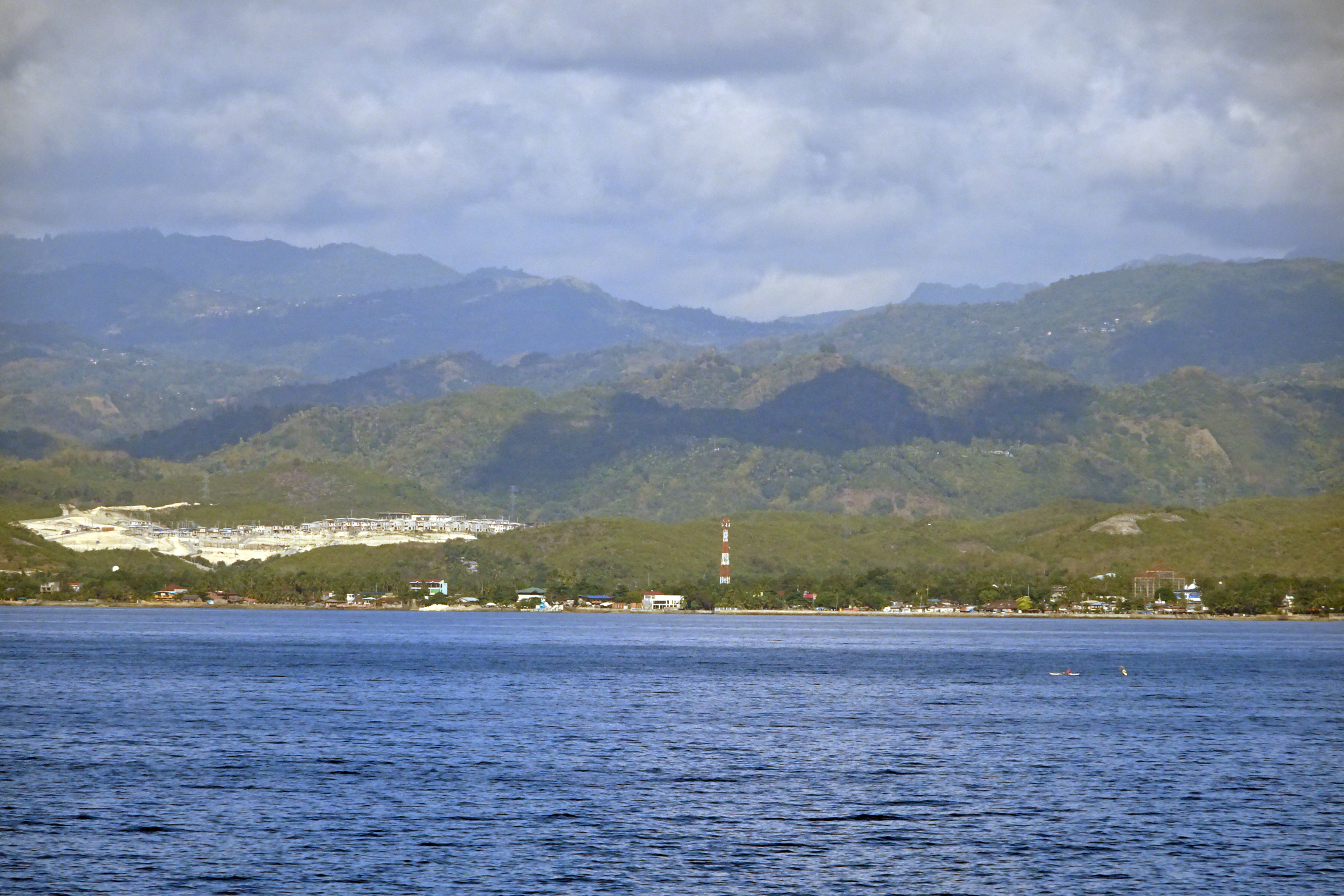 Compostela, Cebu, Philippines